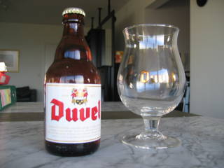 Foto gemaakt door mijzelf (s. govaerts) Indien u deze foto wilt gebruiken voor uw eigen website, gelieve in kleine letters te vermelden foto door "S. Govaerts"